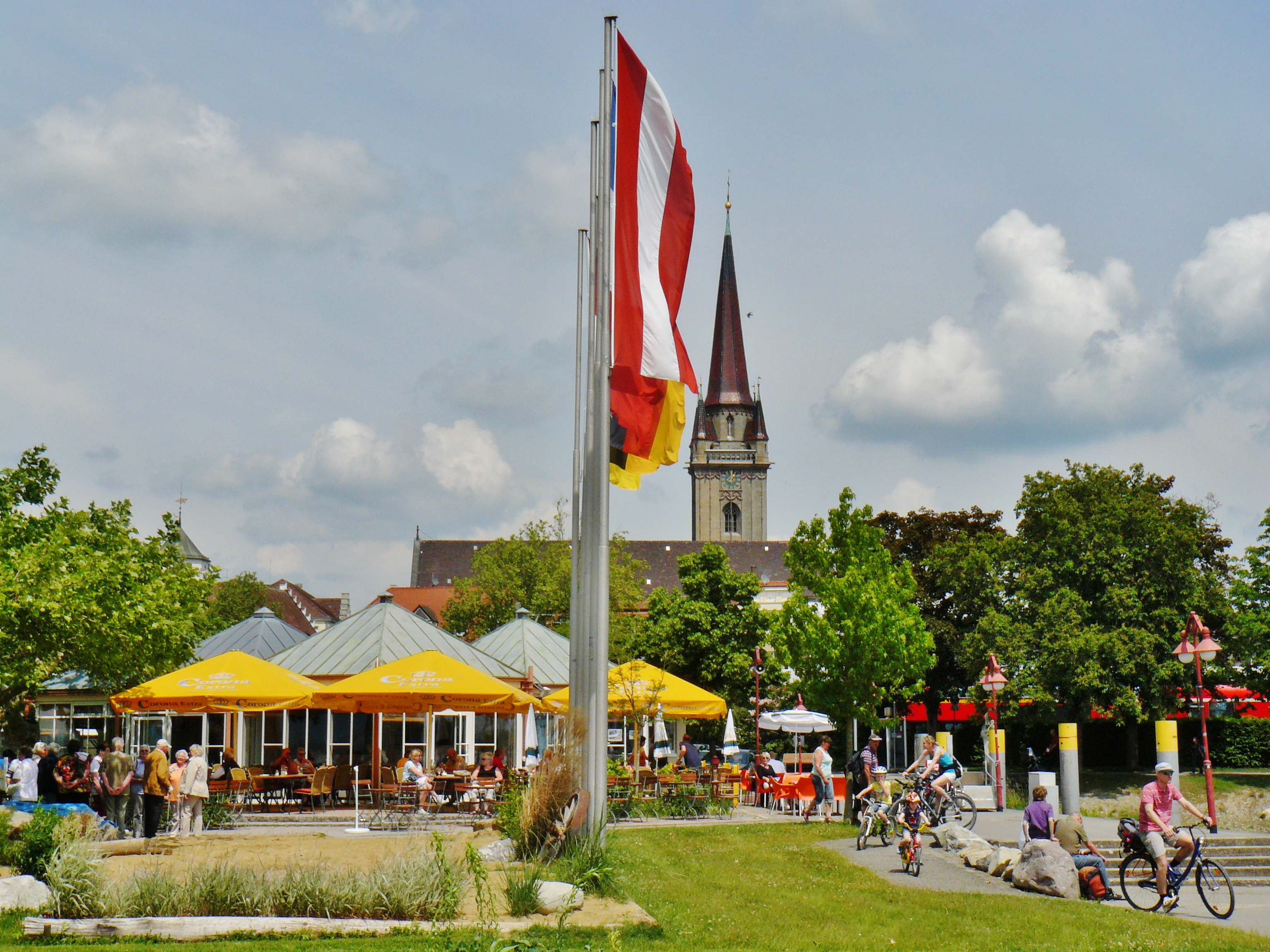 Cafe Molen in Radolfzell